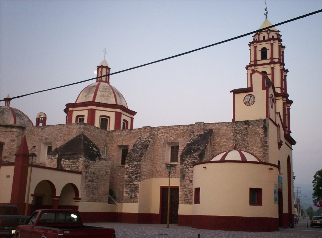 Iglesia de Santa Gertrudis, San Luis Potosí